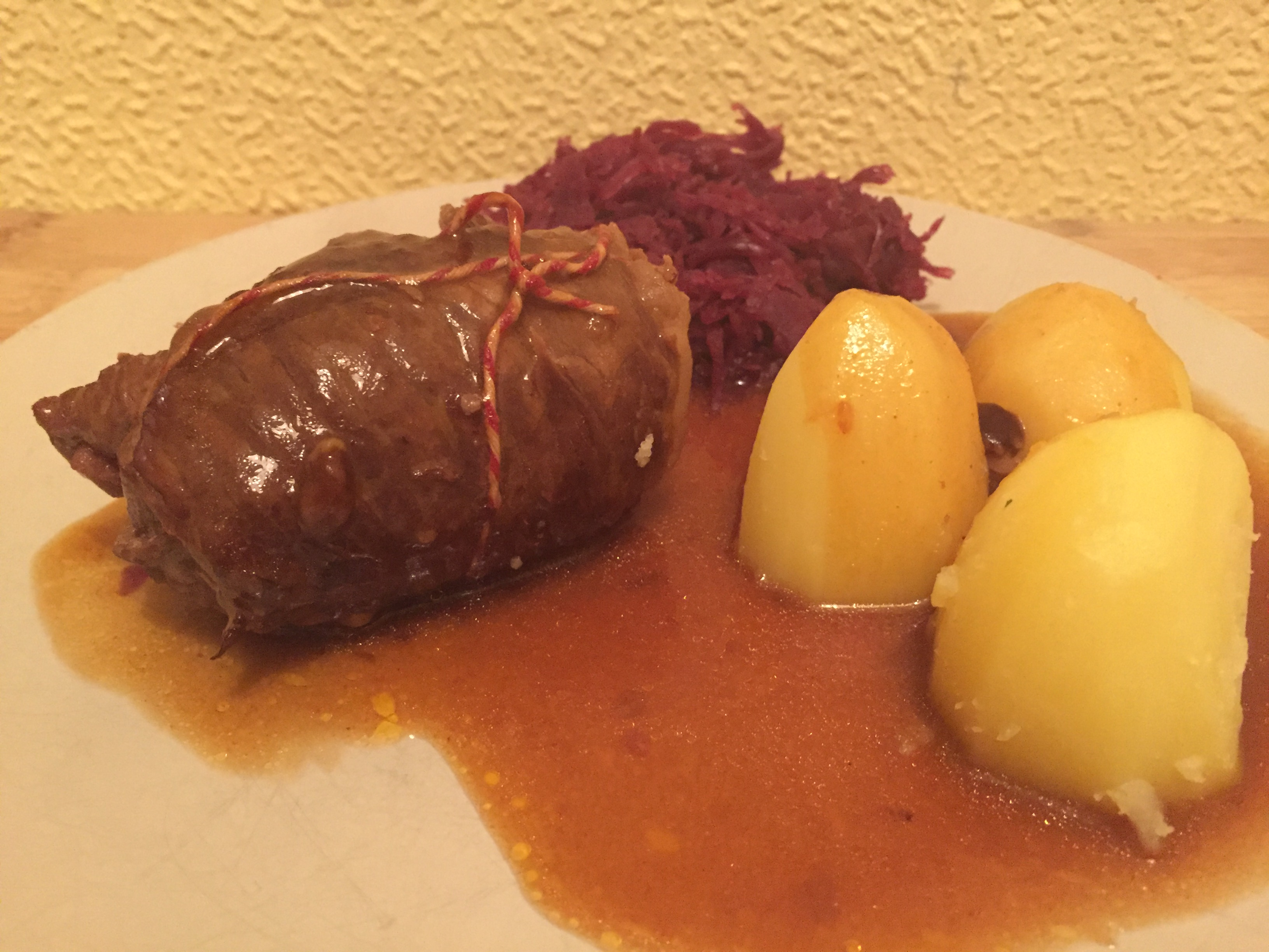 Rullfleesk